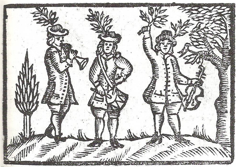 Daske spillemænd - Danish musicians from 1723